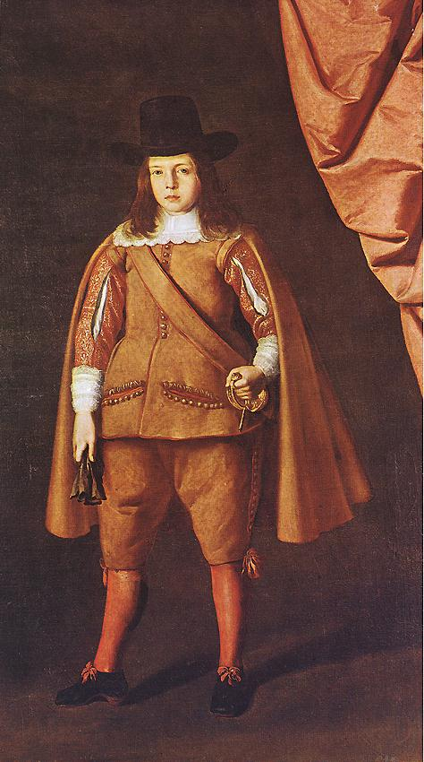 Retrato juvenil del aristócrata y político español Juan Francisco de la Cerda Enríquez de Ribera (1637-1691), marqués de Cogolludo y posteriormente VIII duque de Medinaceli.